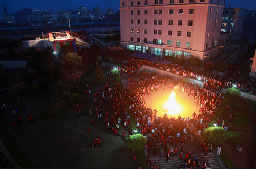 此图片展示了大连育明高级中学举办篝火晚会的情形